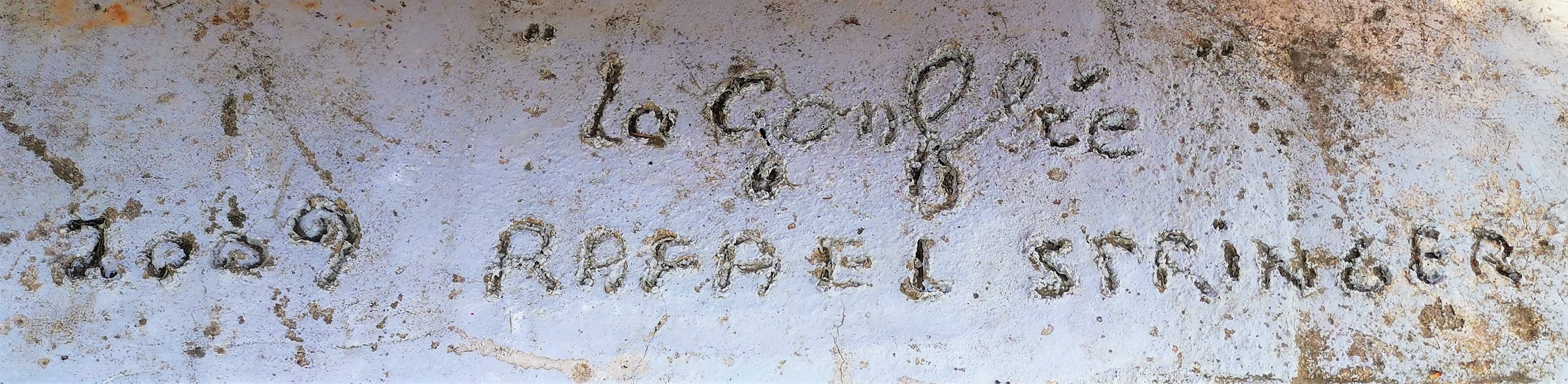 Luxembourg. Signature de Rafael Springer sur sa sculpture "La gonflée" (2009).